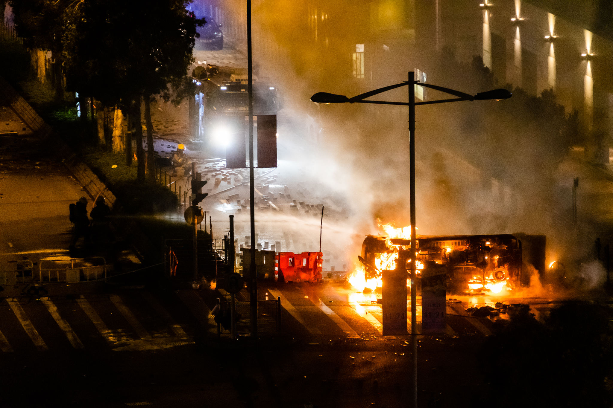 Tseung Kwan O 2019.11.11